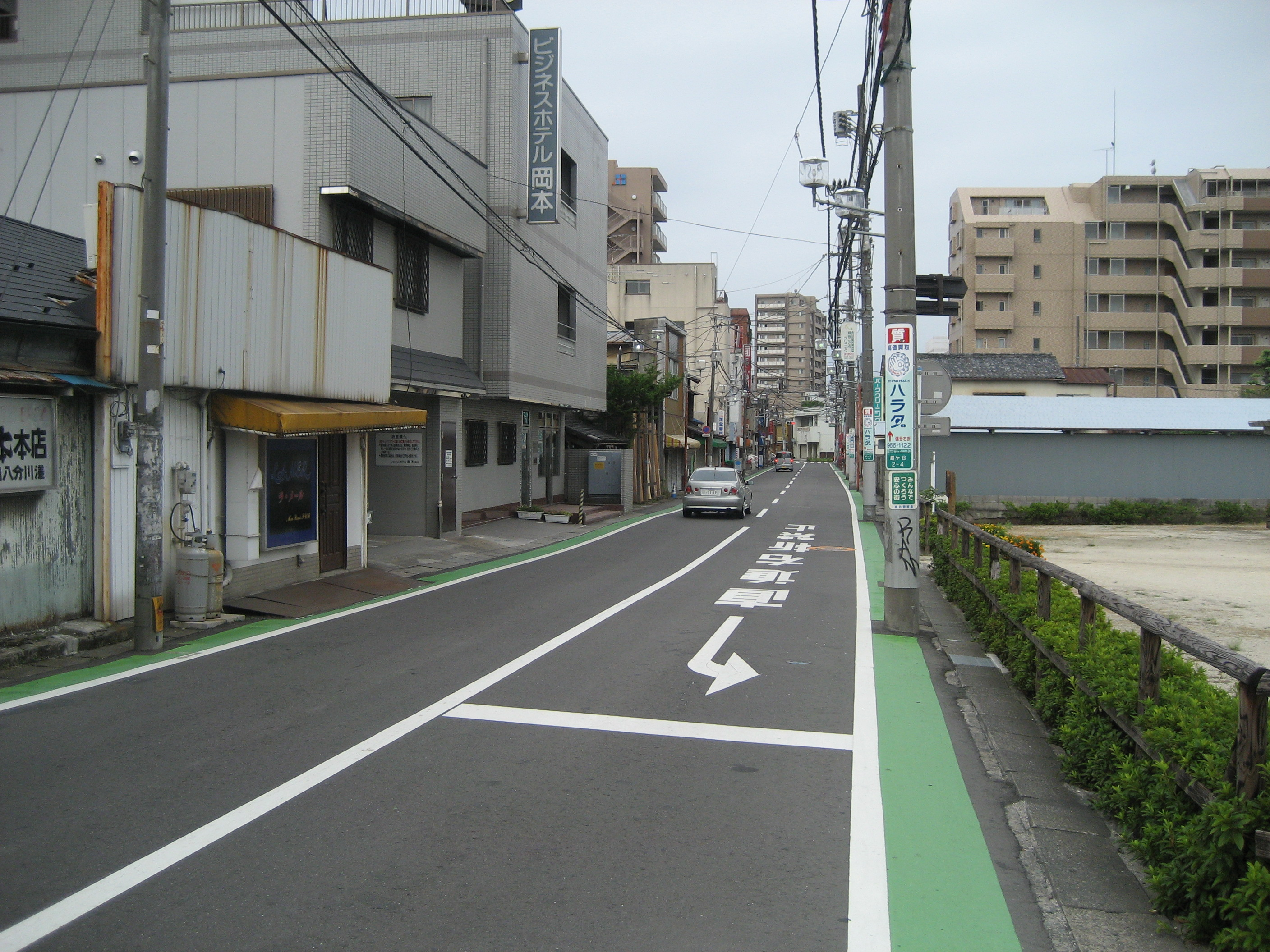 埼玉県道404号線越谷駅方面